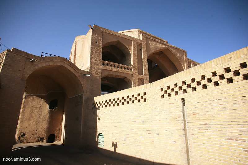 مسجد خسرو شهر اردستان- عکس از امیررضا توسلی